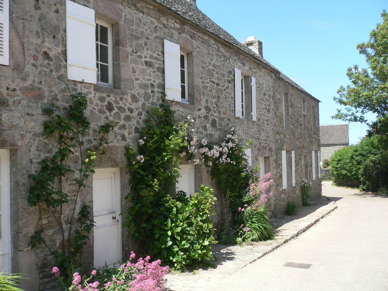 Maison natale du peintre Jean-François Millet